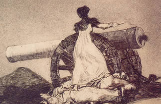 Grabado que alude a la heroica participación de Agustina de Aragón en la primera defensa de Zaragoza. La mujer se encarama sobre los cadáveres de los artilleros para utilizar el cañón y disparar contra el enemigo francés. Es la única escena que presenta Goya con un protagonista concreto en toda la serie.